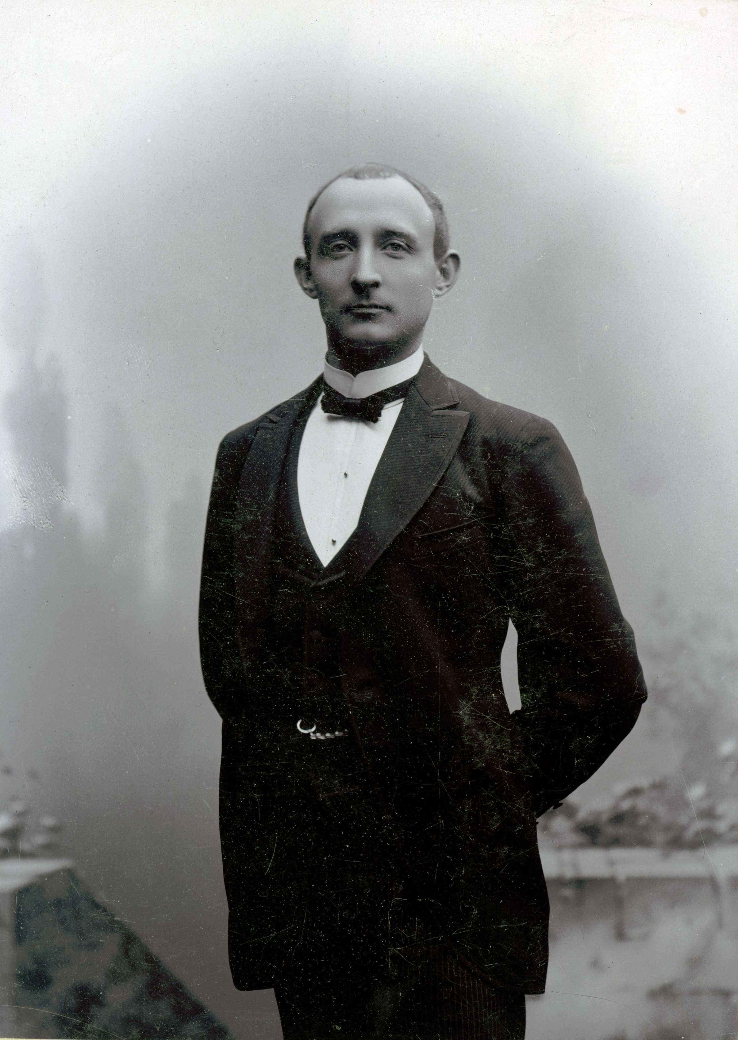 Victor Lundberg, skådespelare vid Stora teatern i Göteborg 1891